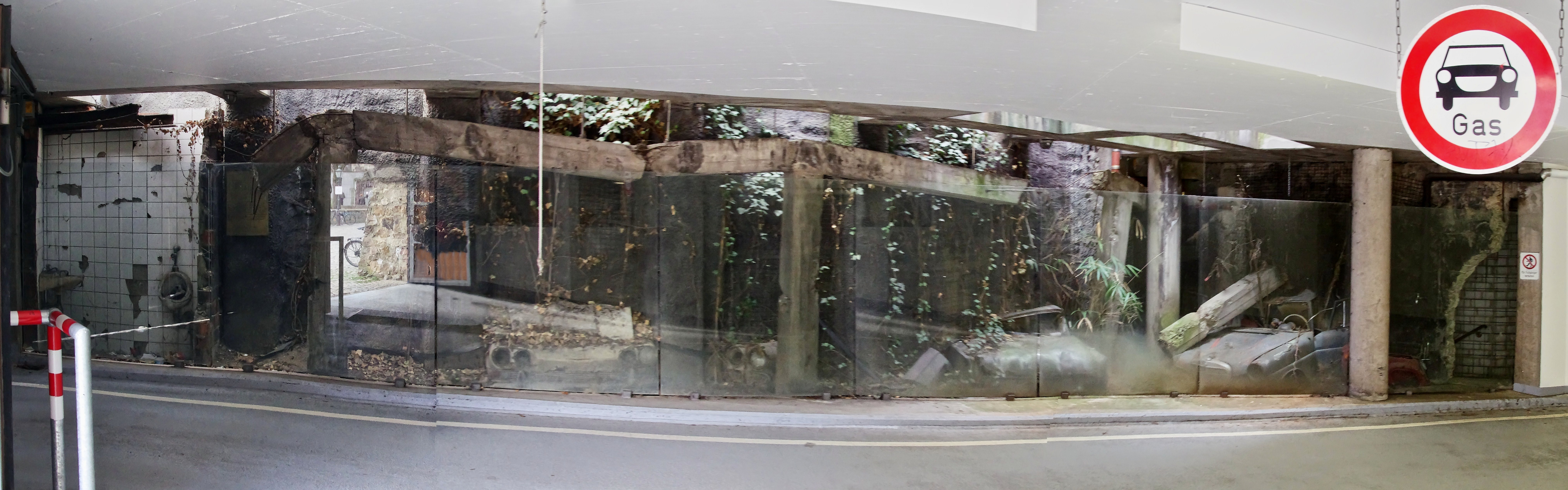 Autoschrott-„Archäologie“, Raymond E. Waydelich